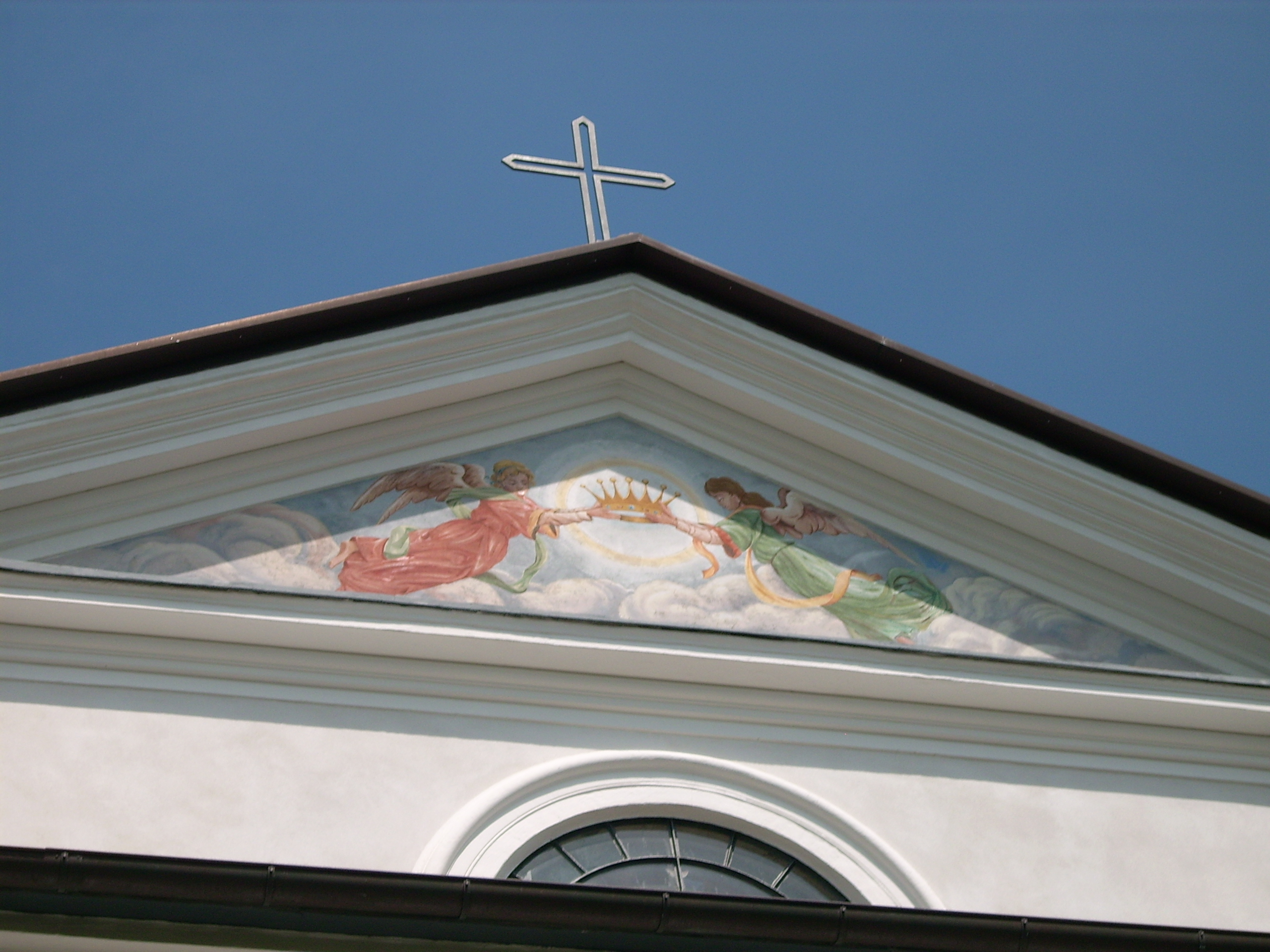 Santuario di Nostra Signora della Guardia a Velva, Castiglione Chiavarese, Liguria, Italia